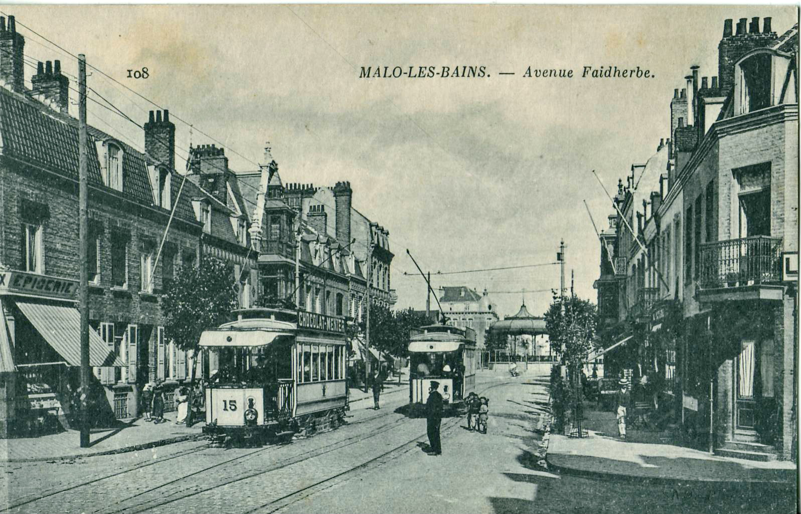 Carte postale ancienne éditée par ND, n°108 : MALO-LES-BAINS - Avenue Faidherbe